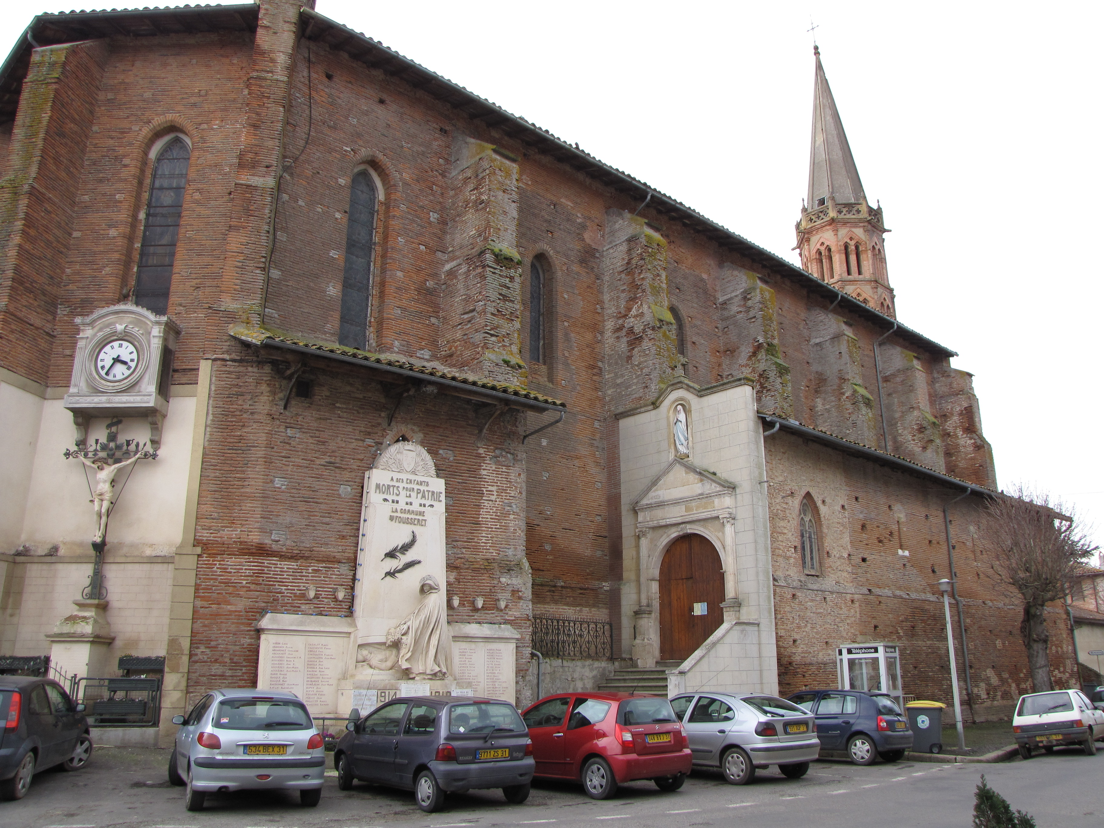 Église du Fousseret